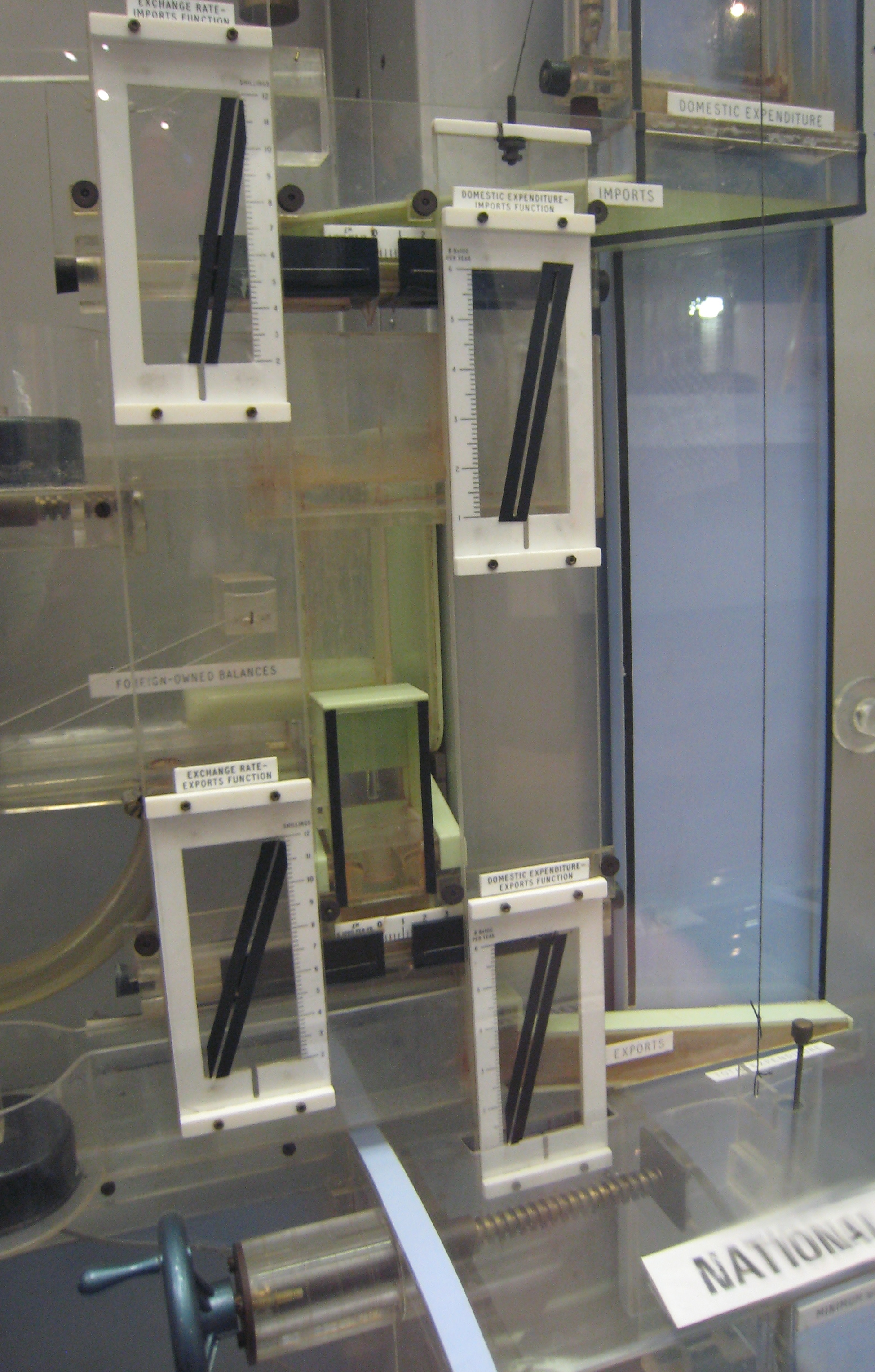 MONIAC Dashboard